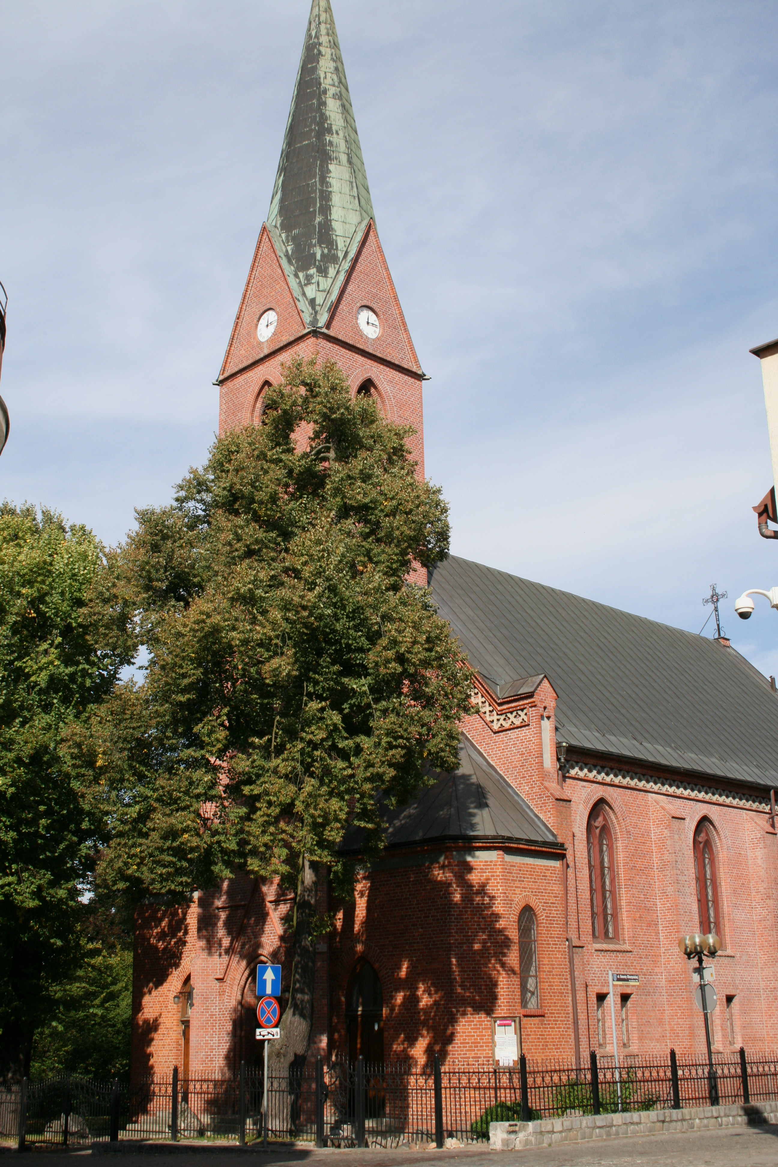 Olsztyn, ul. Zamkowa - kościół ewangelicko-augsburski p.w. Chrystusa Zbawiciela, 1876-1899